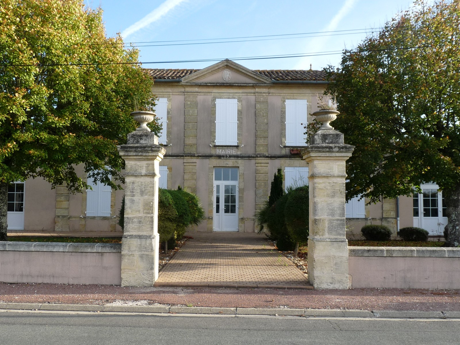 Mairie de Générac, Gironde, France